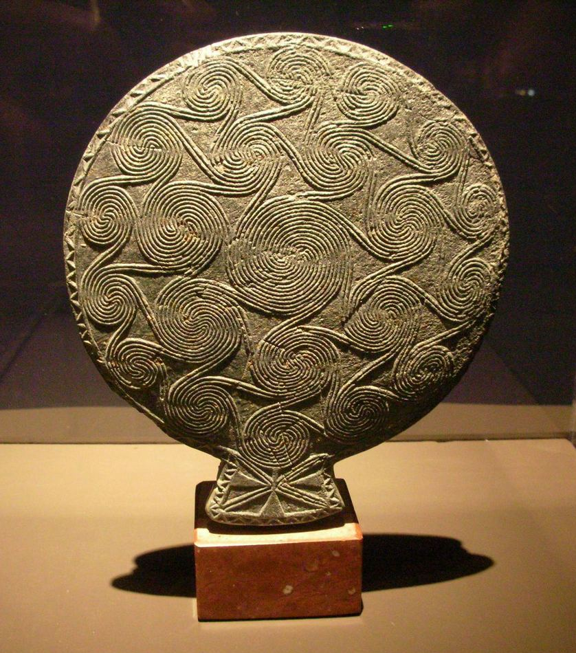 Griffschale FKII (Inventar-Nr. 75/11, Thimme Nr. 364), Badisches Landesmuseum Karlsruhe . this cycladic "frying pan" was returned to Athens in 2014